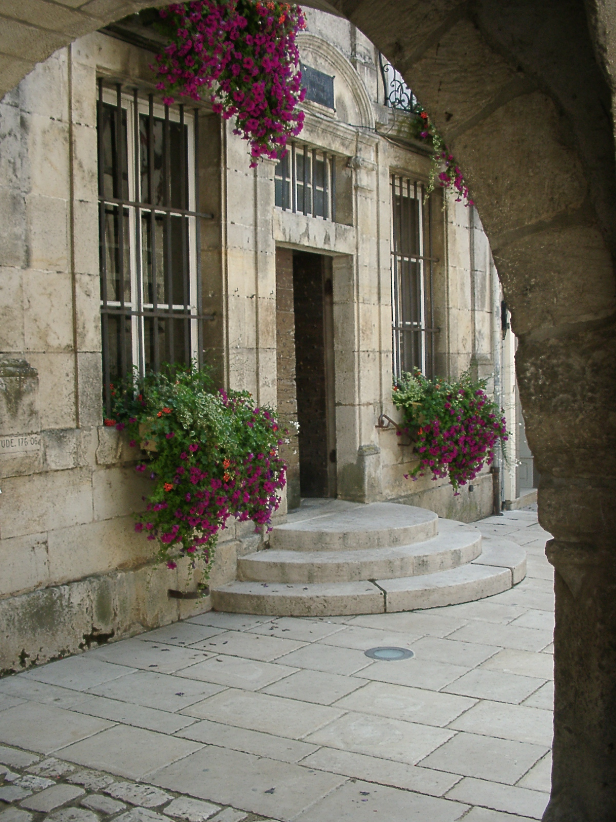 Noyers-sur-Serein : arcades et façade de l'hôtel de ville -août 2006 -photo personnelle -Henri JACHET